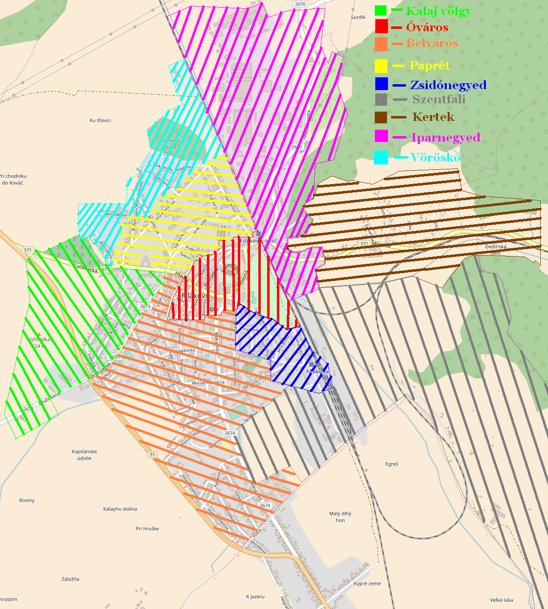 Fülek negyedei